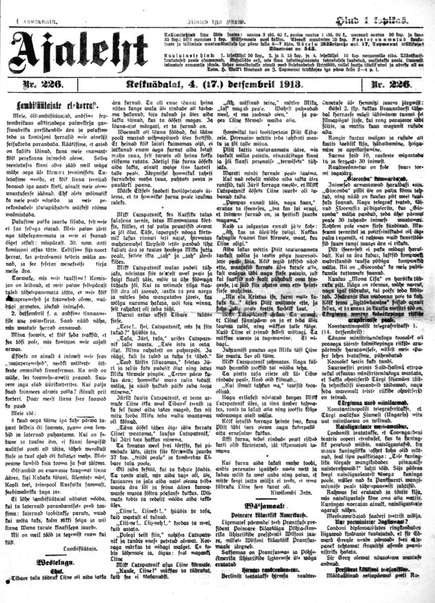 Ajaleht 1913